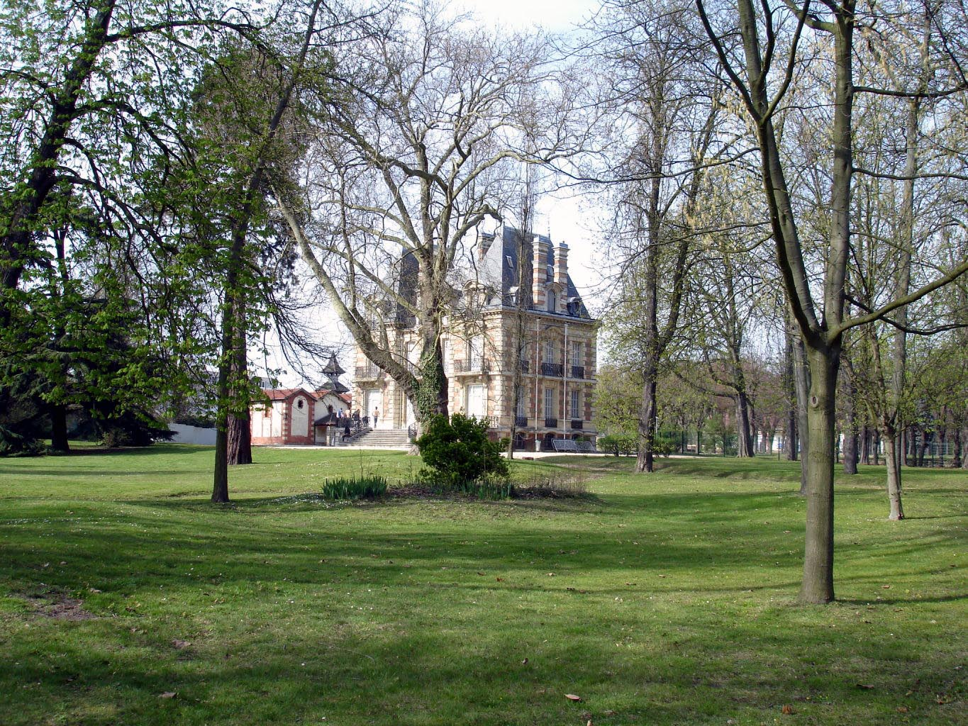 Château et parc du Val-Joli à Eaubonne (Val-d'Oise), France